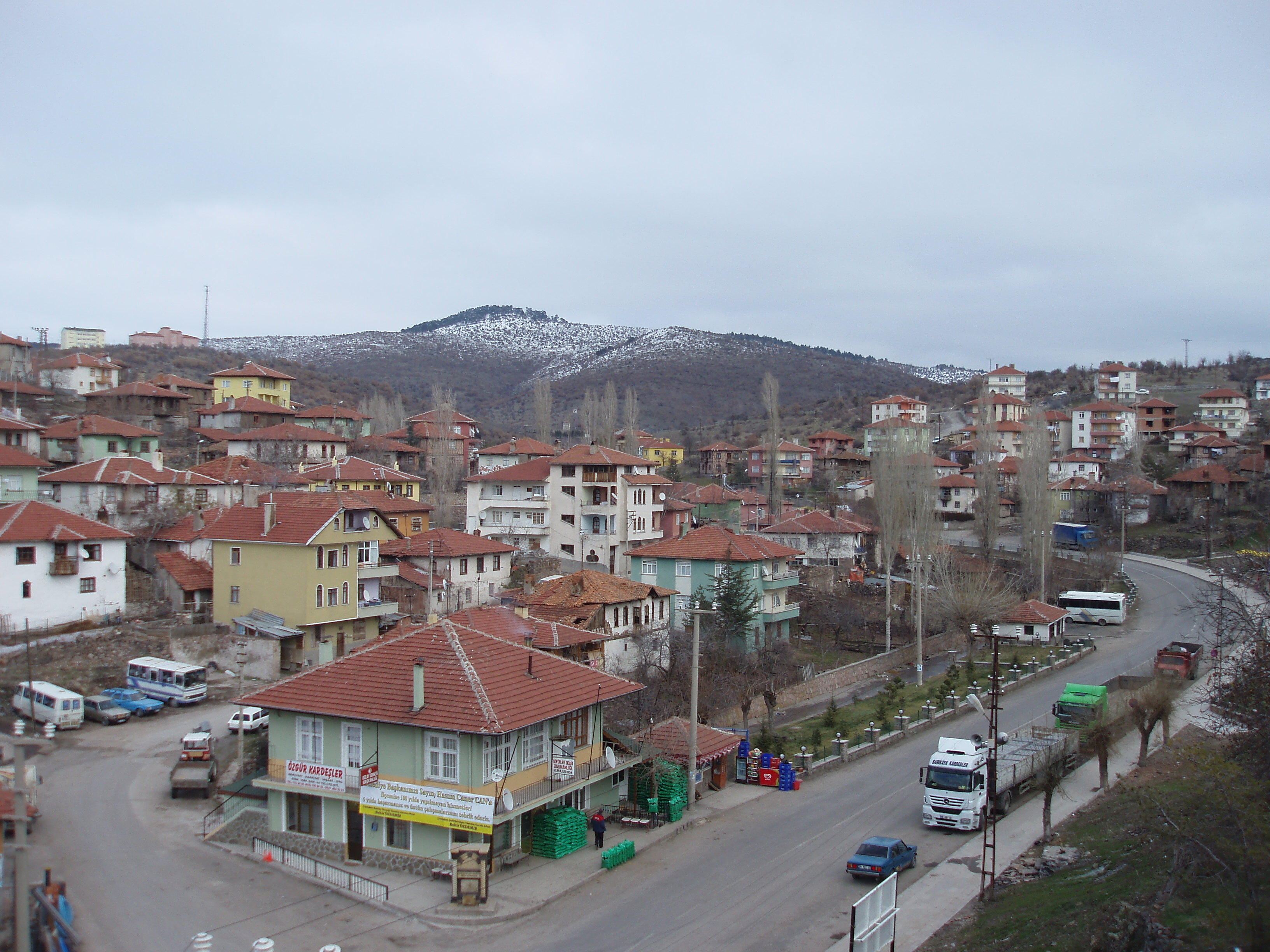 Ankara Çamlıdere